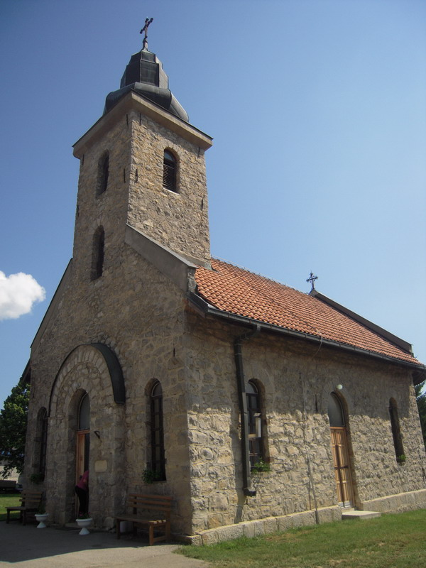 Hram Sv. Nikolaja (Živinice)